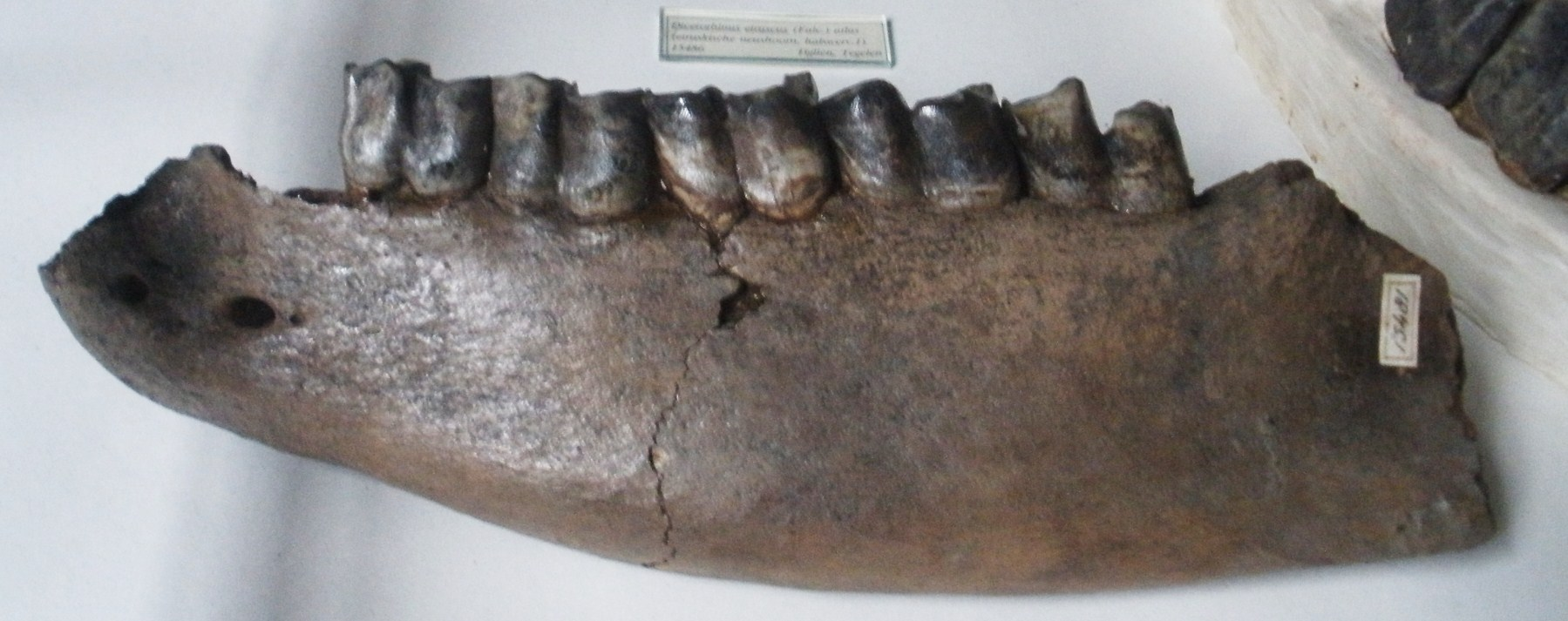 Fossil of Stephanorhinus, an extinct rhinoceros- Took the photo at Teylers Museum, Haarlem